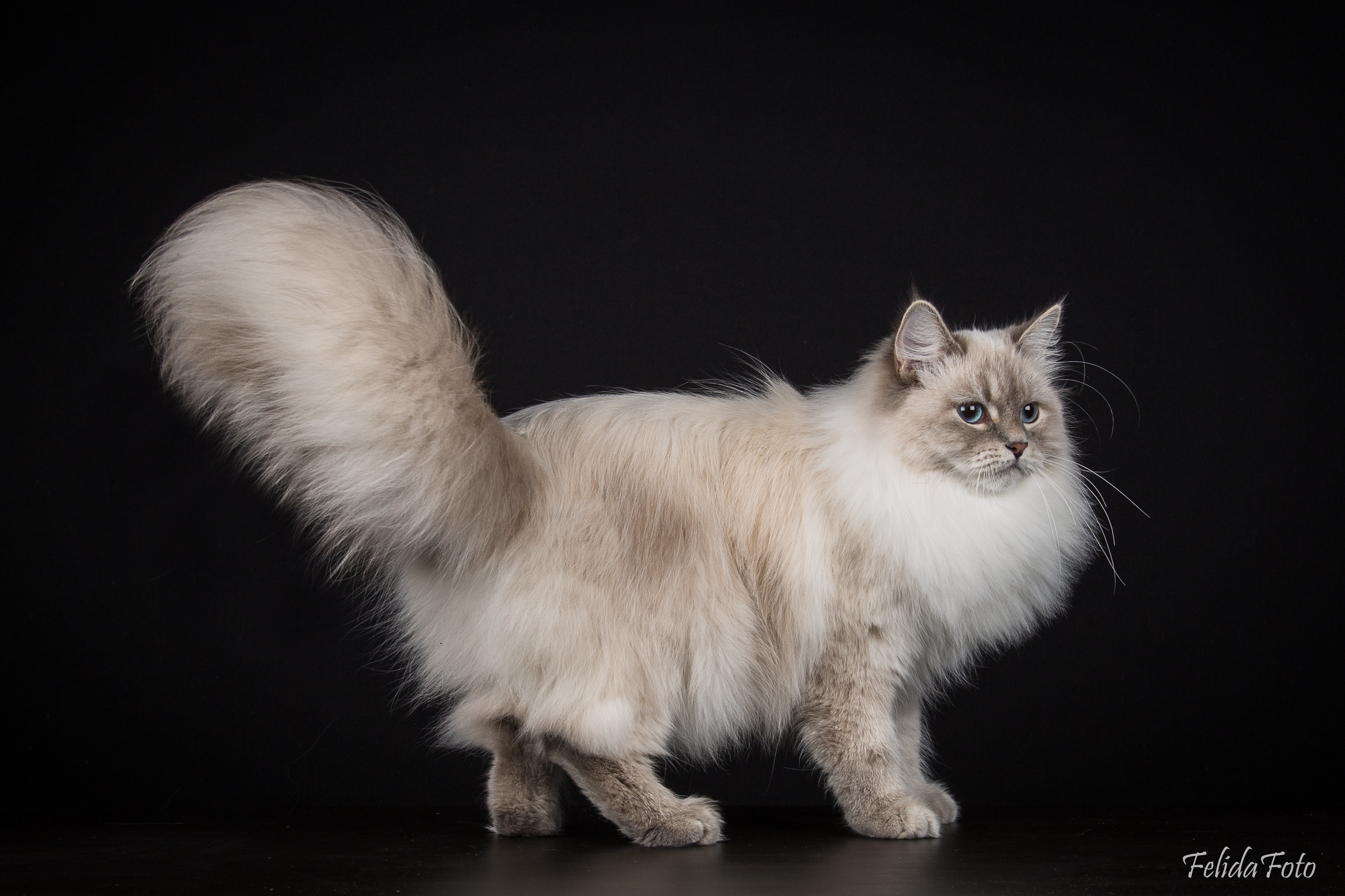 Blue tabby neva masquerade